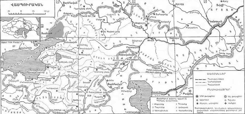 Վասպուրական